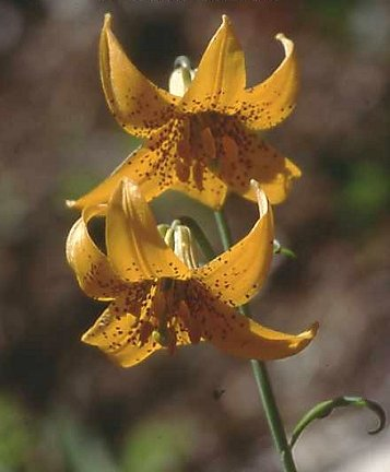 Lilium columbianum